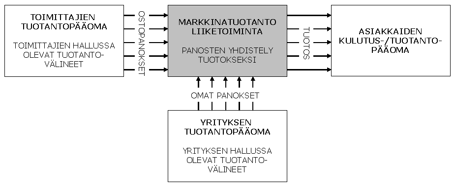 Kuvaus varanto- ja virtasuureista tuotannossa